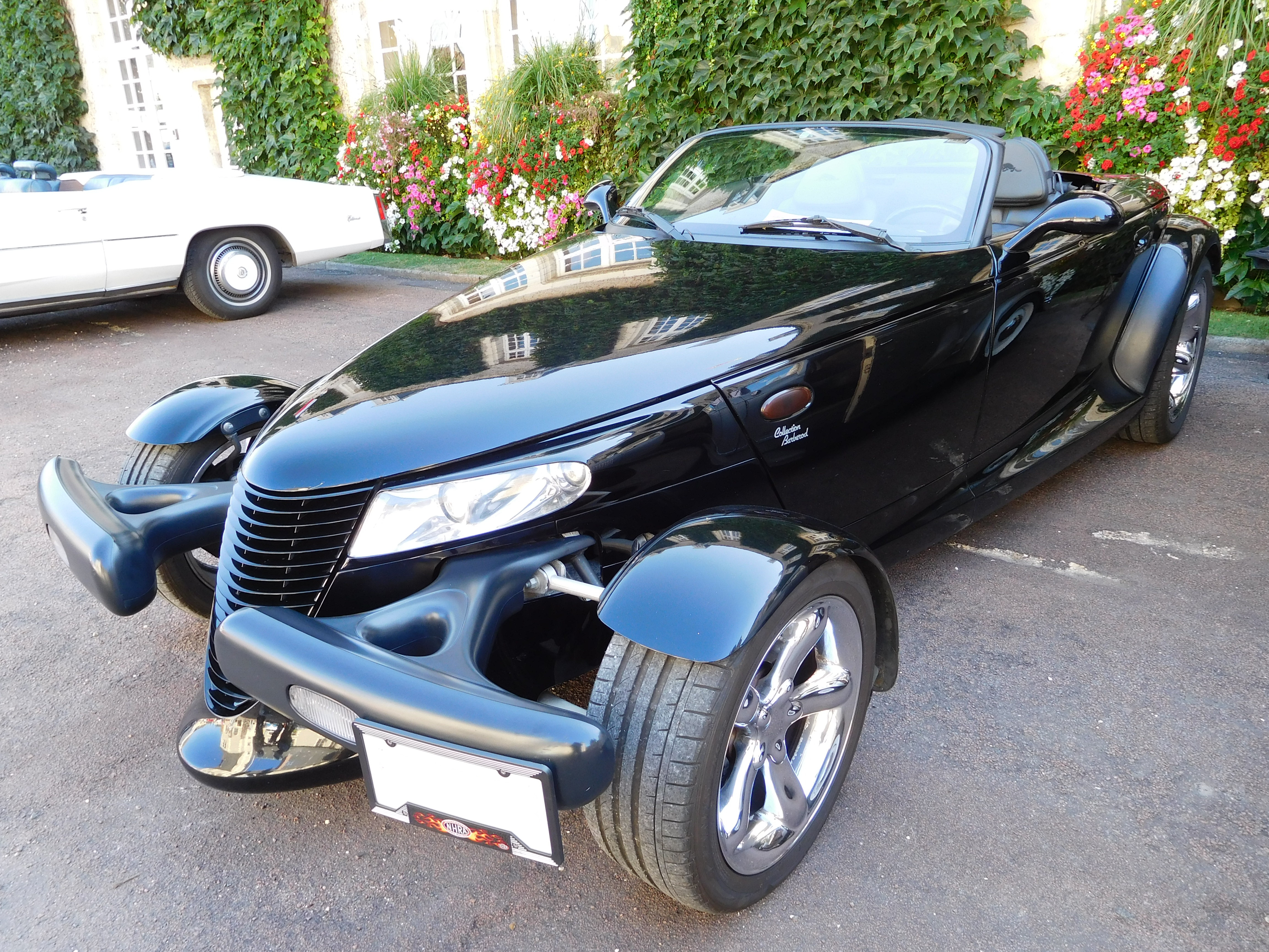 Plymouth Prowler noir de 2000, moteur V6 Chrysler 3,5 L de 253 ch, consommation 10 L/100 km à 90 km/h, 20 CV fiscaux. Collection (Hervé et Sylvie) « Barberod ». Roadsters montés entièrement à la main. Environ une centaine d'exemplaires en France. Exposition de véhicules, Aubigny-sur-Nère, Cher, France.